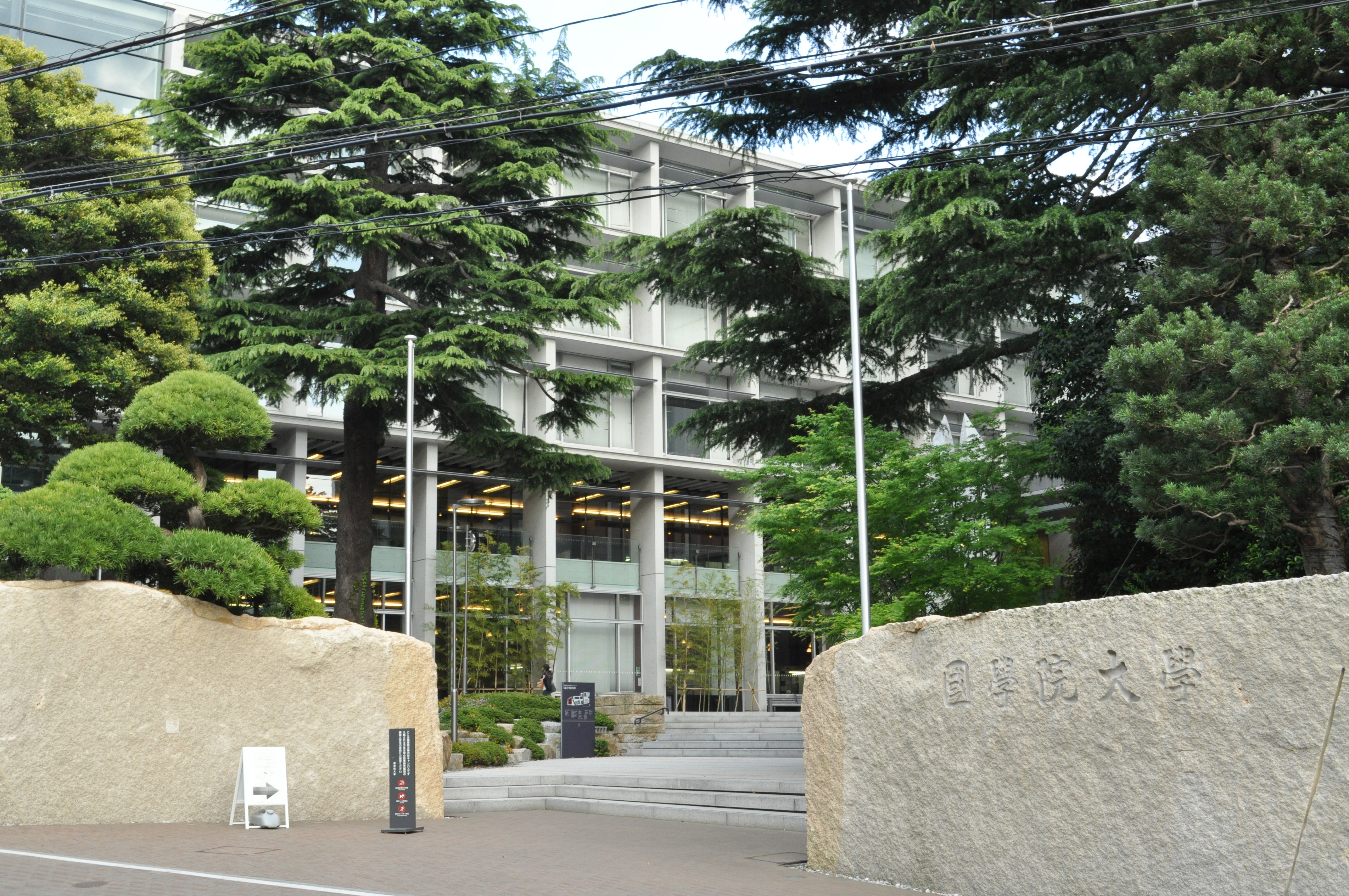 國學院大學渋谷キャンパス